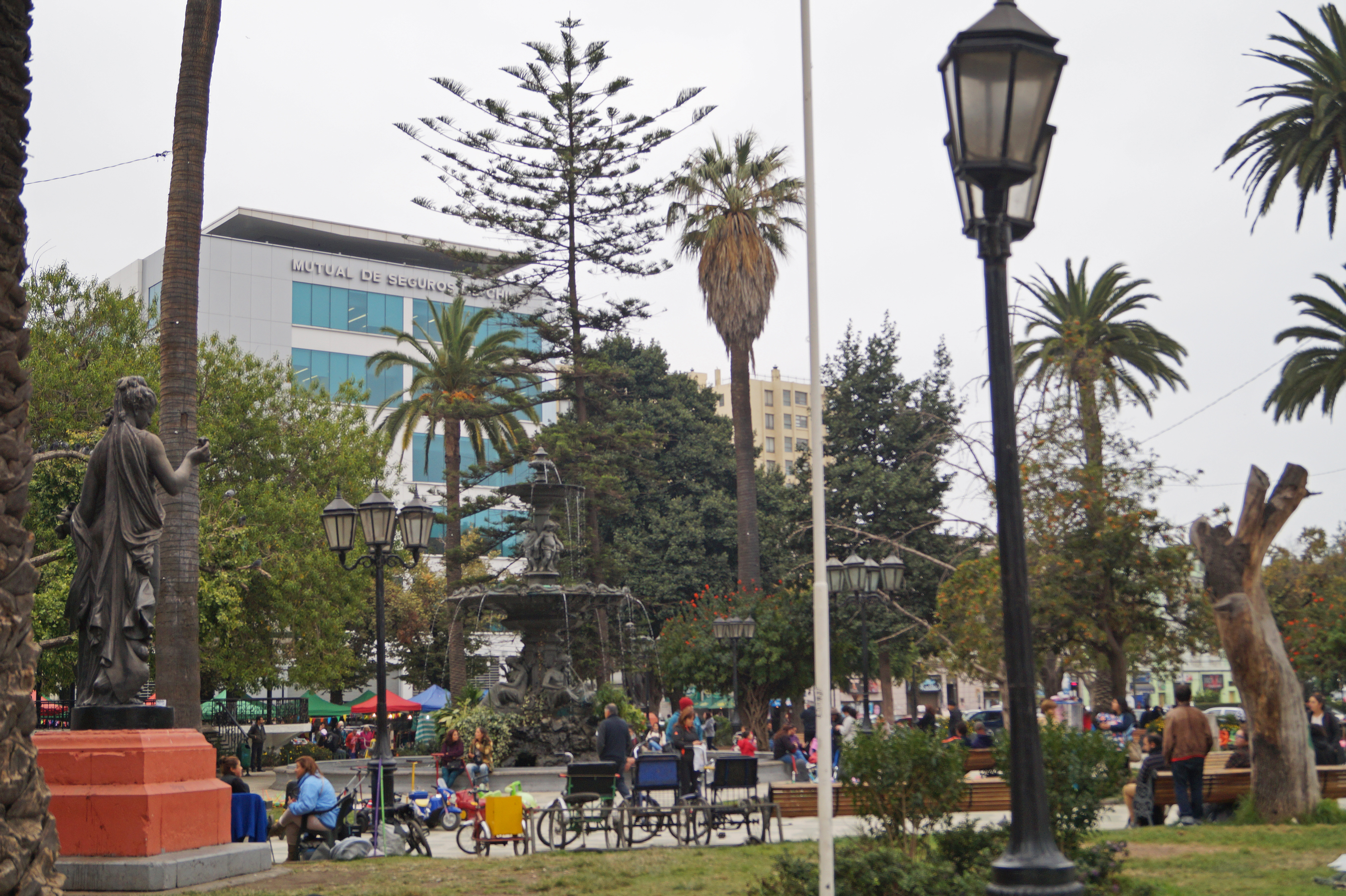 Plaza Victoria de Valparaíso, Chile